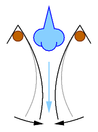 Bernoulli-effect and hydrodynamic paradoxon: Blown air (light blue) between two pages of paper (gray) does not seperate the pages but pulls them together